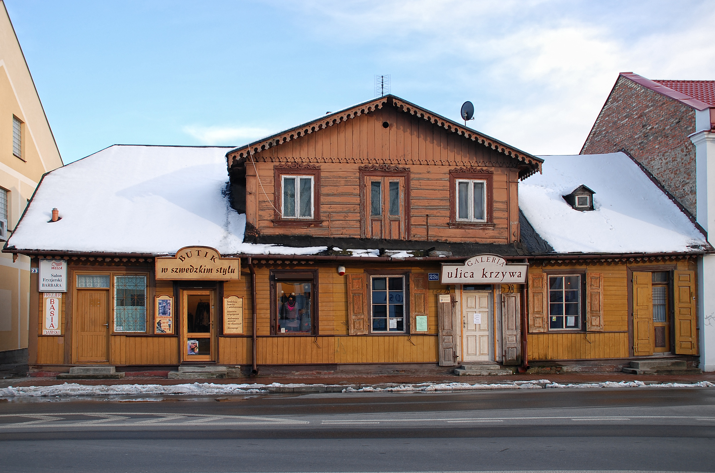 Biała Podlaska – licznie występująca do dziś drewniana zabudowa w centrum miasta.